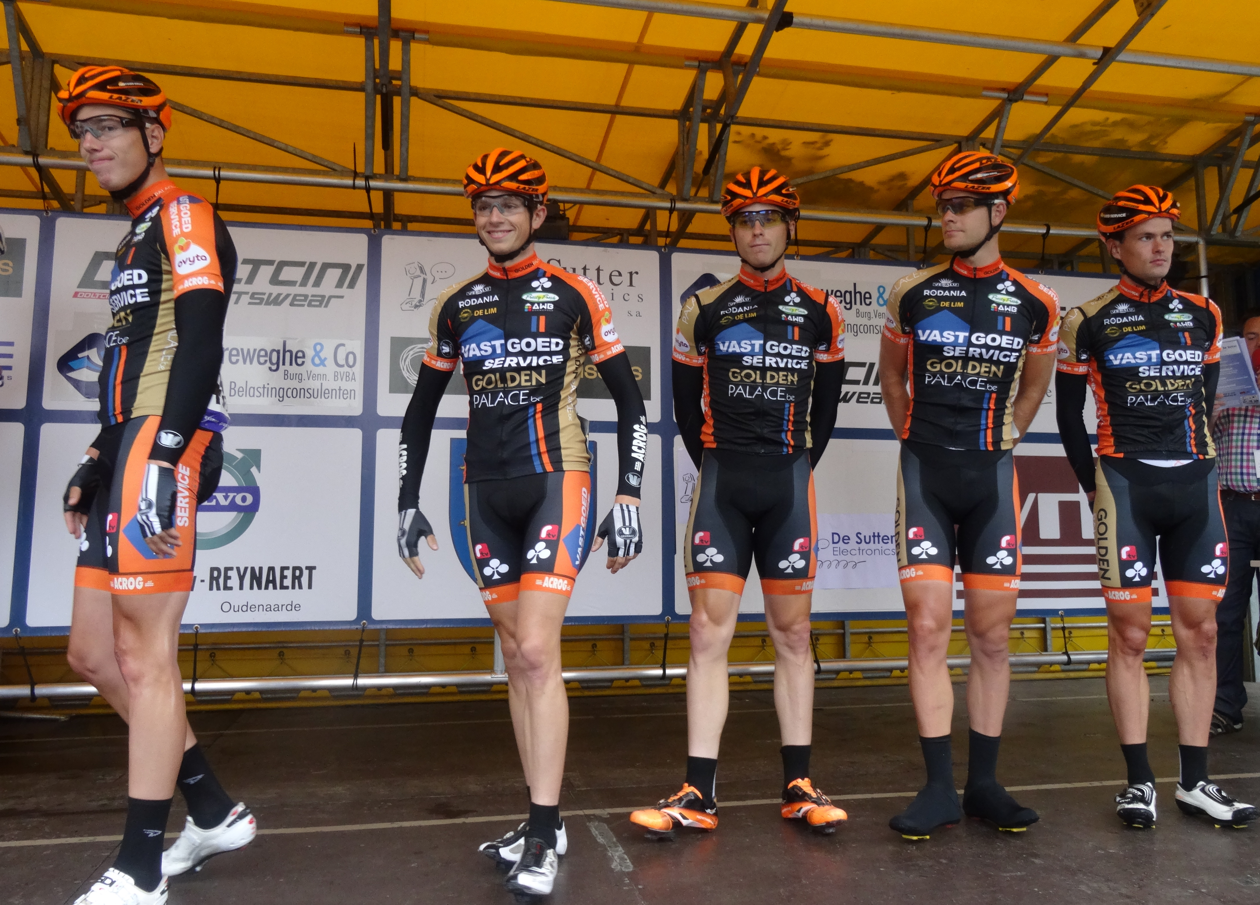 Reportage photographique réalisé le samedi 5 juillet à l'occasion du départ et de l'arrivée du Circuit Het Nieuwsblad espoirs 2014 à Grotenberge (Zottegem), Belgique.